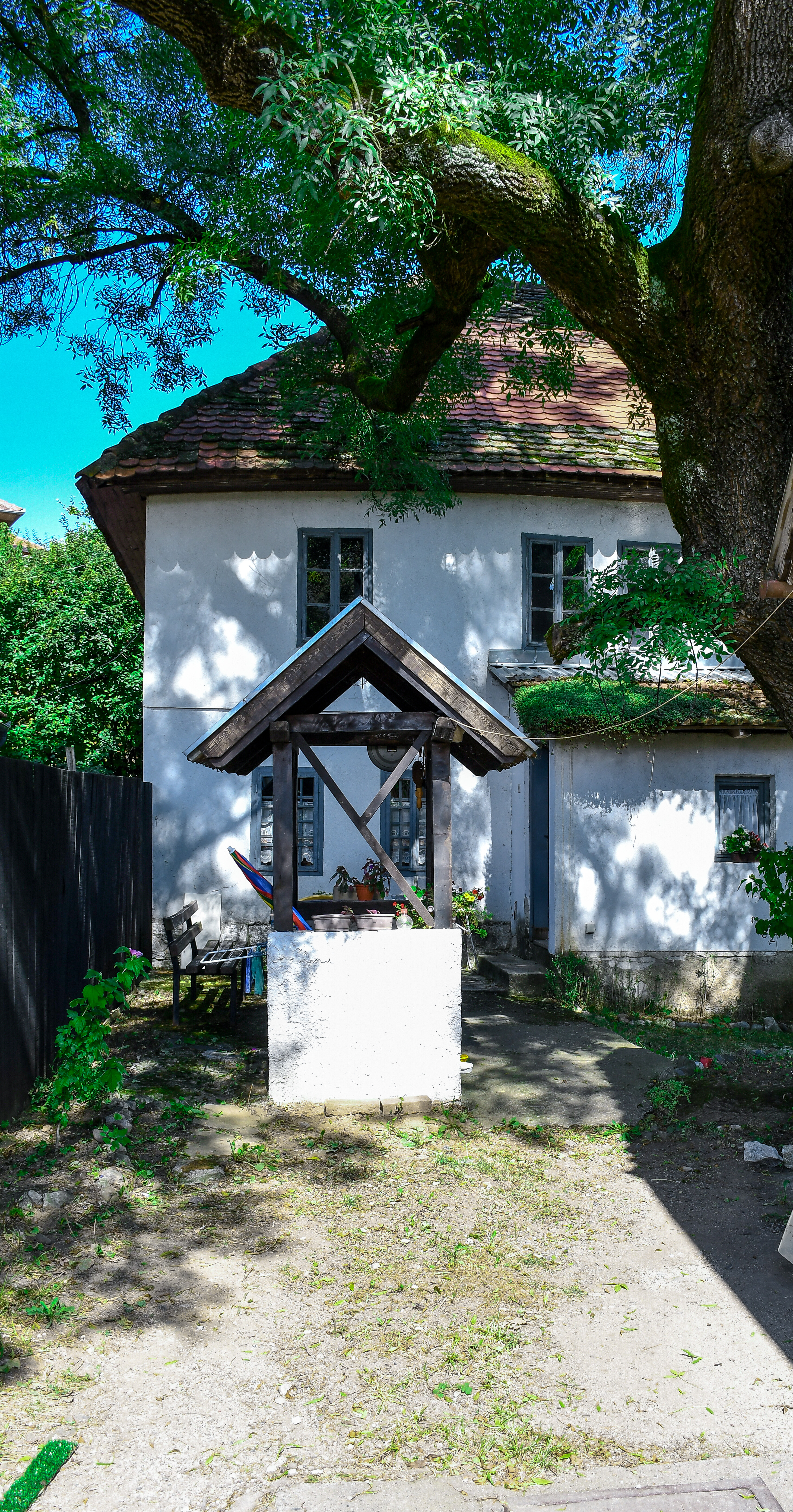 This image was uploaded as part of Trace of Soul 2019.